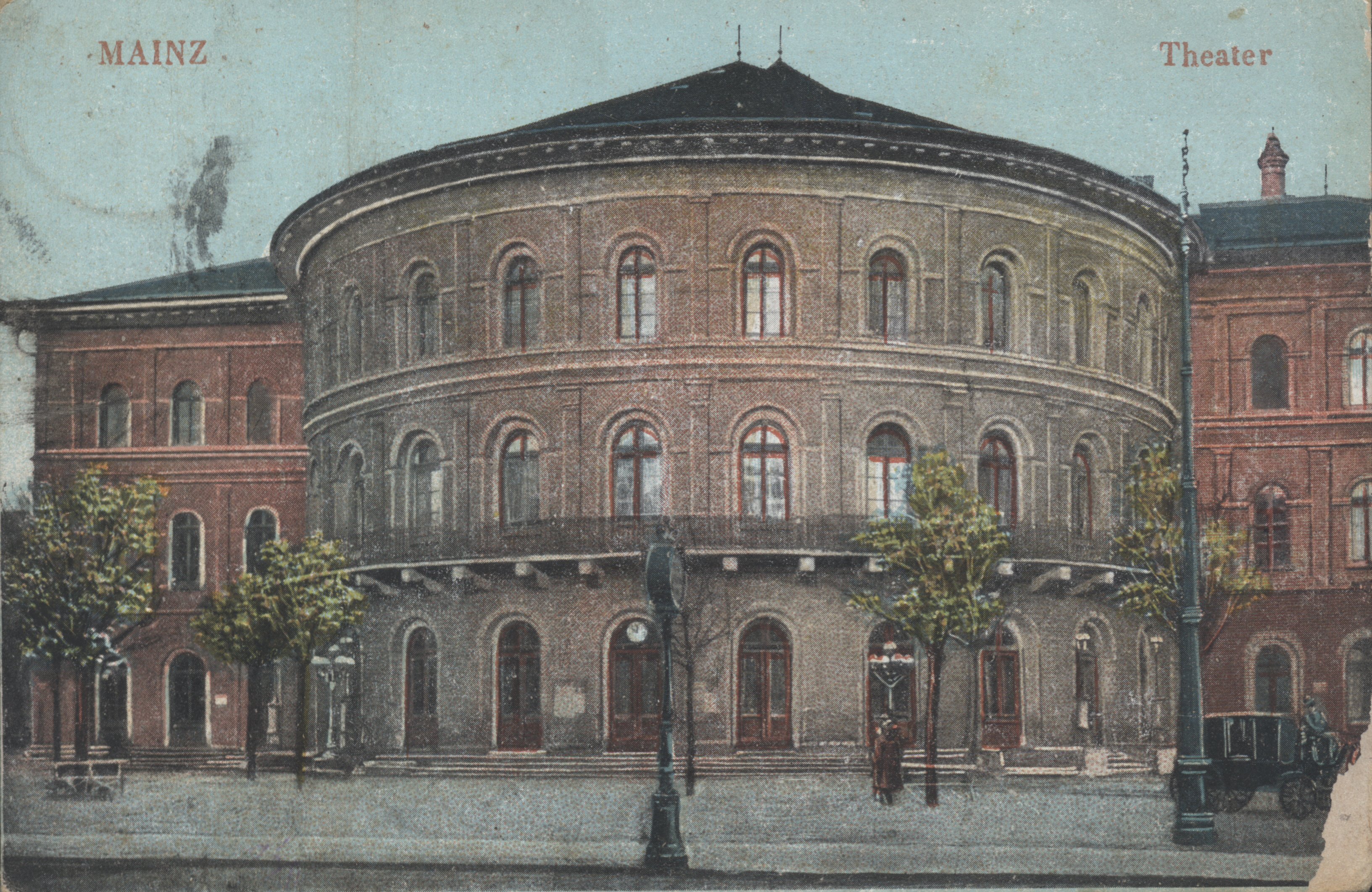 Mainz, Theater (in Mollers originaler Gestaltung vor den Umbauten)